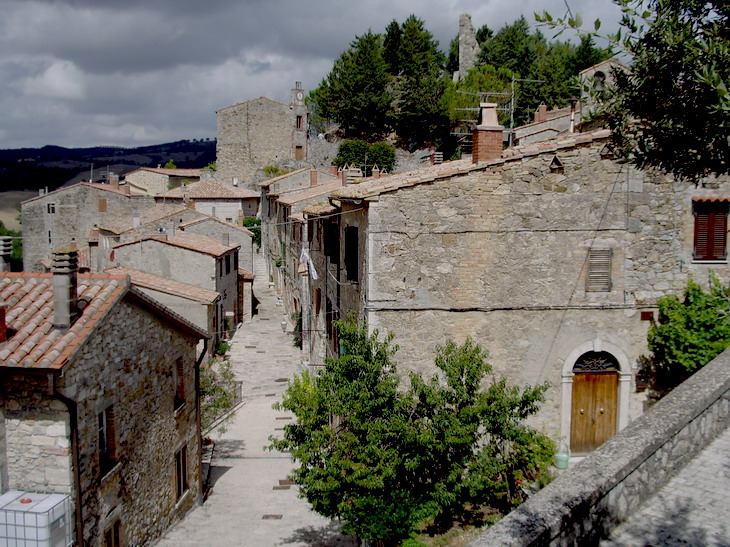 Panorama di Rocchette di Fazio (GR)